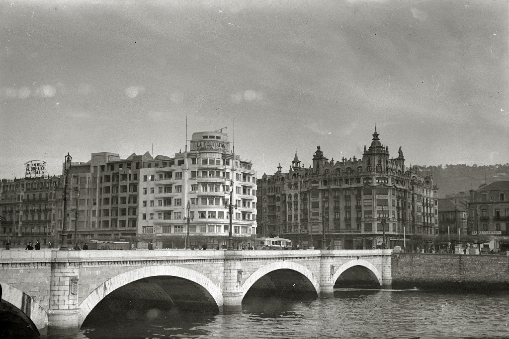 VISTA DEL EDIFICIO DE LA EQUITATIVA Y PUENTE SANTA CATALINA